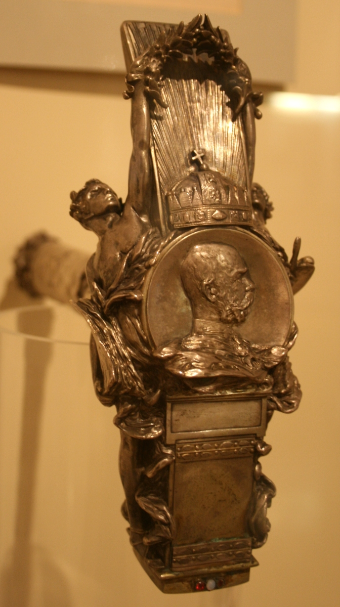 u Muzeju grada Zagreba Simbolični čekić kojim je car i kralj Franjo Josip I. otvorio Hrvatsko zemaljsko kazalište u Zagrebu. Robert Frangeš Mihanović, izliven kod Turbelina, cizelirano po C. Waschmanu, Beč, jesen 1895. godine (srebro, dragulji). Čekić je remek-djelo mladog Roberta Frangeša Mihanovića. Načinio ga je na nagovor prof. Ise Kršnjavoga u rekordnom vremenu od jedanaest dana. Na dršku su simbolično prikazane četiri muze - drama, tragedija, komedija i opera - a na kladivu simbolična ženska i muška figura kao znak umjetnosti i znanosti te medaljon s likom vladara. Čekić je bio izložen na Milenijskoj izložbi u Budimpešti 1896. godine - na kojoj je dobio veliku nagradu - na Međunarodnoj umjetničkoj izložbi u Kopenhagenu 1897. godine, na Izložbi društva hrvatskih umjetnika 1898. godine, na Austro-ugarskoj izložbi u Petrogradu 1899.-1900. godine, a na Međunarodnoj izložbi u Parizu 1900. godine dobitnik je zlatne medalje. Godine 1903. izlagan je u Pragu na izložbi Društvo umjetnosti.